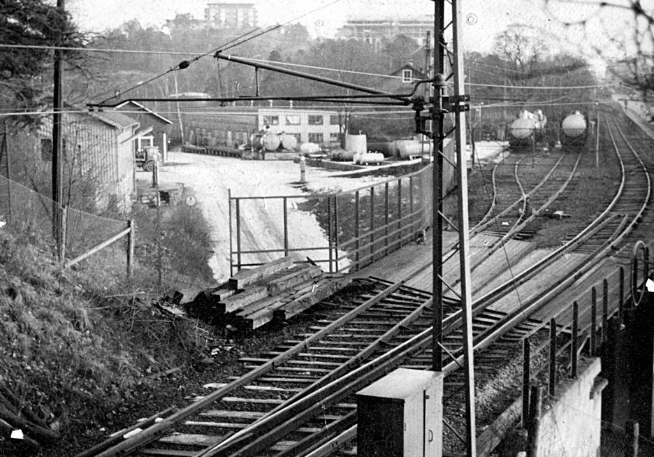 Dockans lastplats, station längs Saltsjöbanan (nedlagd 1964)